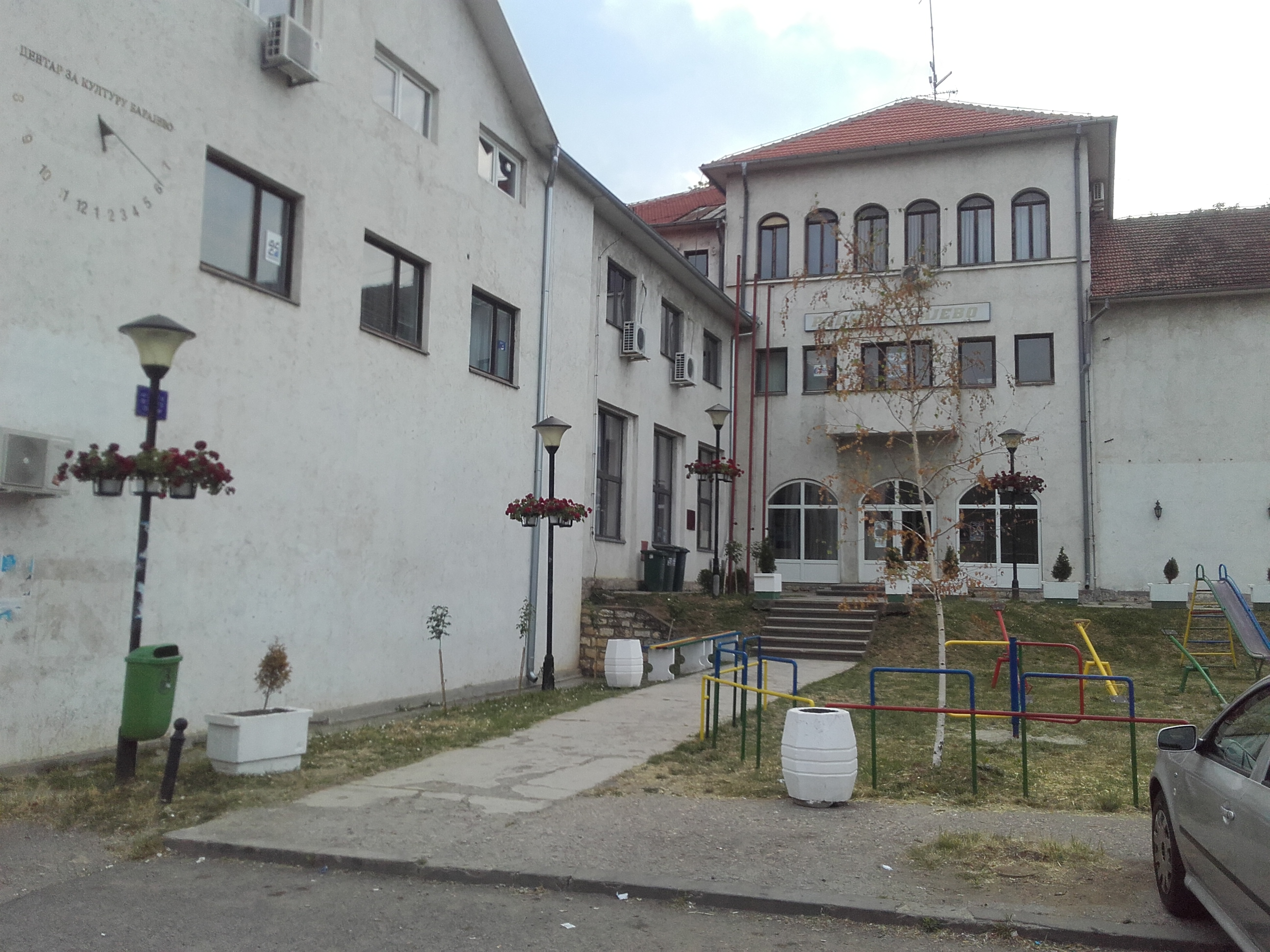 Pogled na Dom kulture gde su smeštene prostorije Centra za kulturu